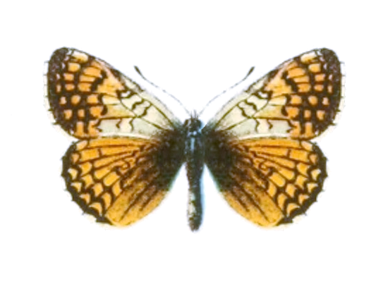 Melitaea sindura Moore f. pallida Stgr. (non Edwards, 1864: preoccupied) = Melitaea solona evadne Hemming, 1934